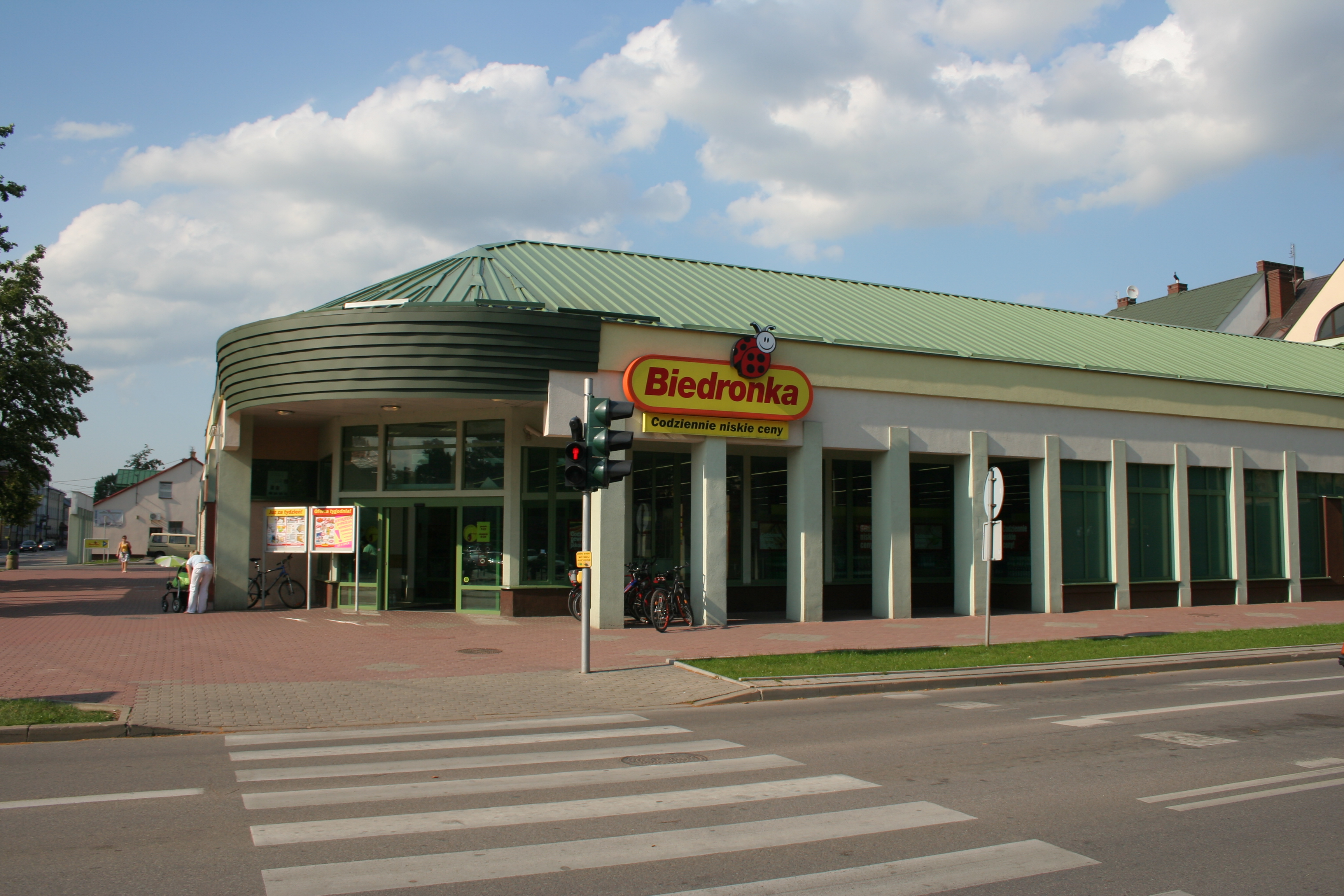 Supermarket Biedronka w Suwałkach.